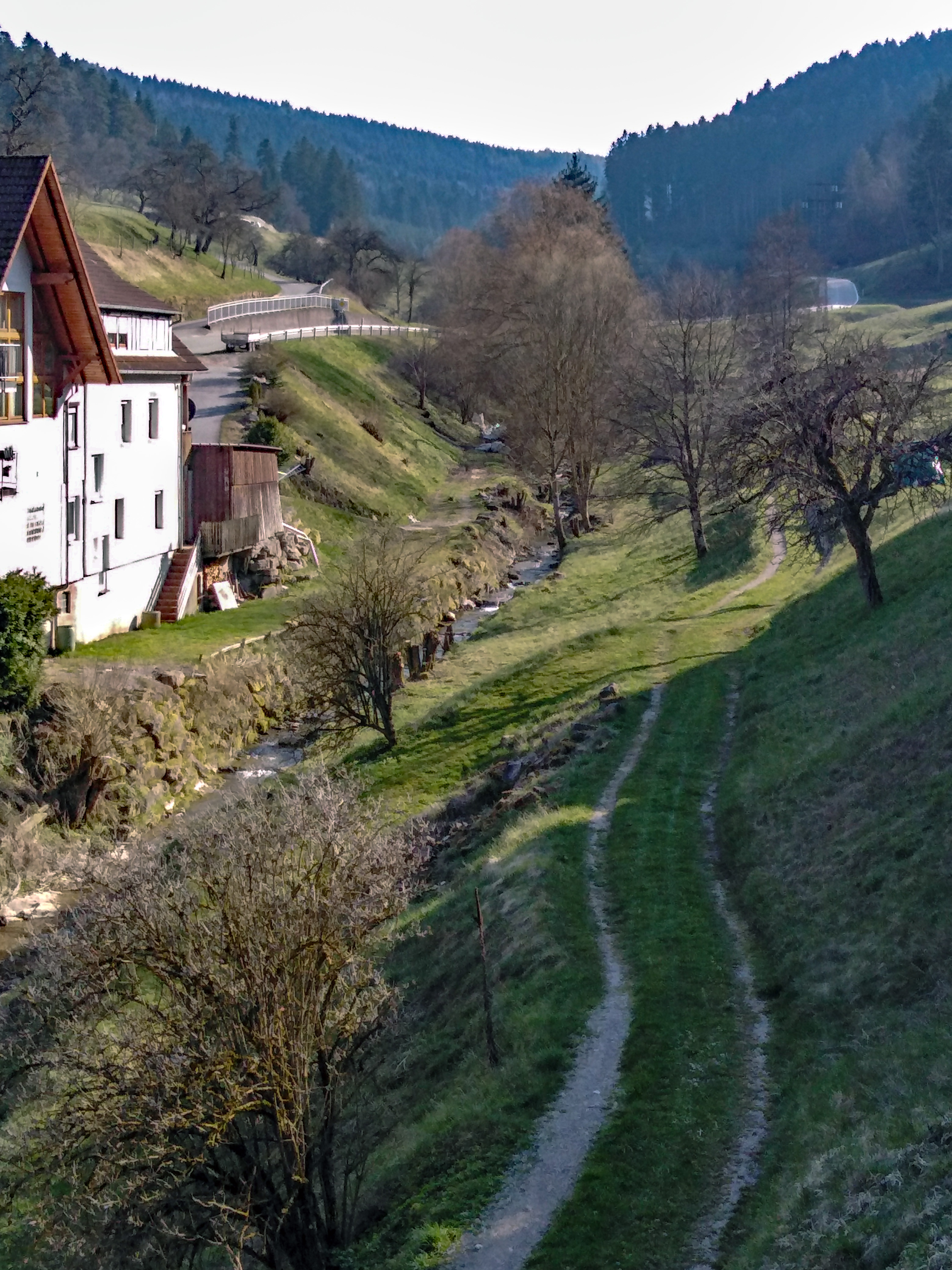 Blick von Bettenhausen Richtung Zitzmannbrunnenbachtal